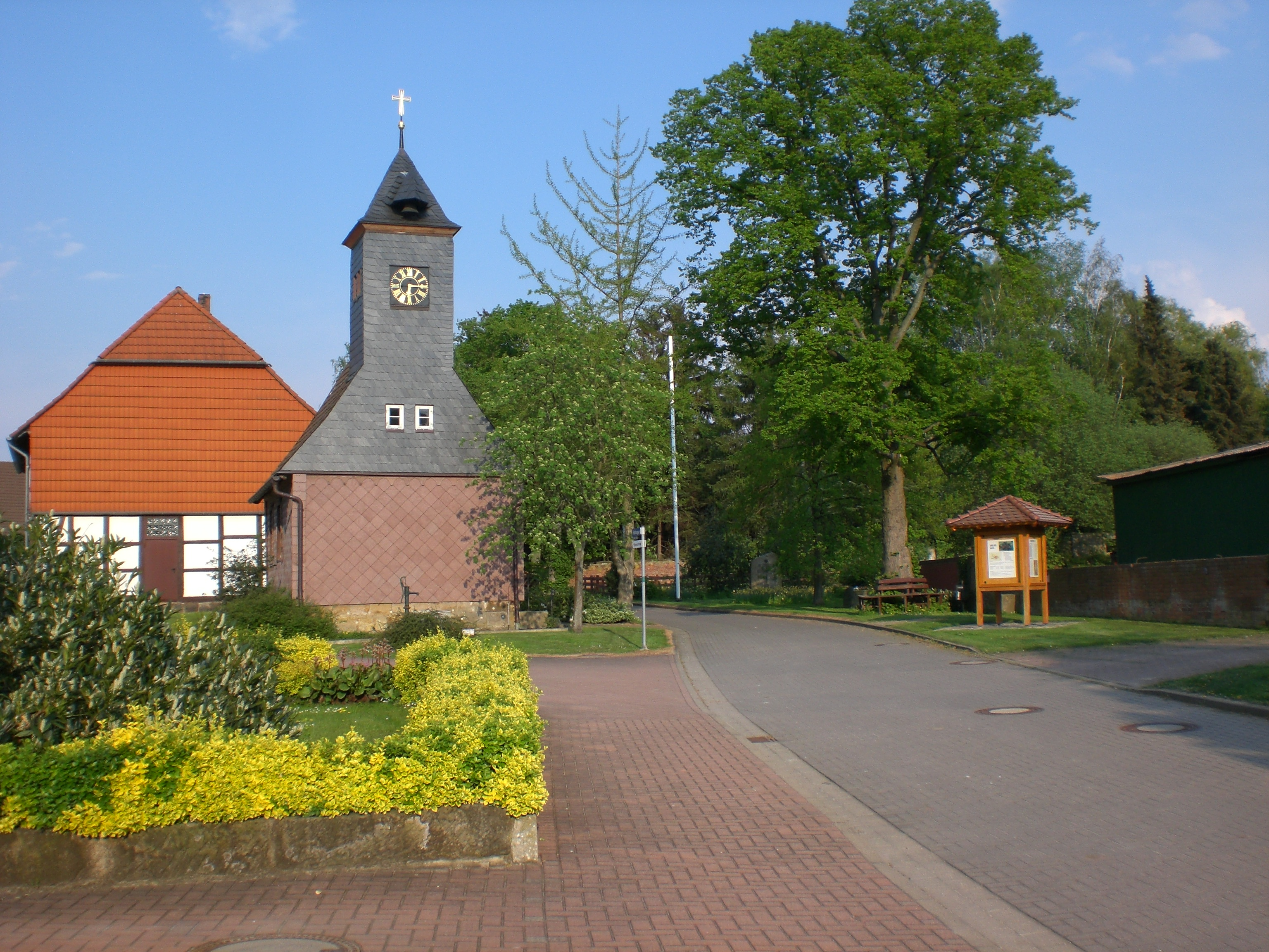 Dorfkern des Ortes Mölme mit Kapelle, Info-Kasten und Gedenkstätte der Gefallenen in den Weltkriegen im Hintergrund.